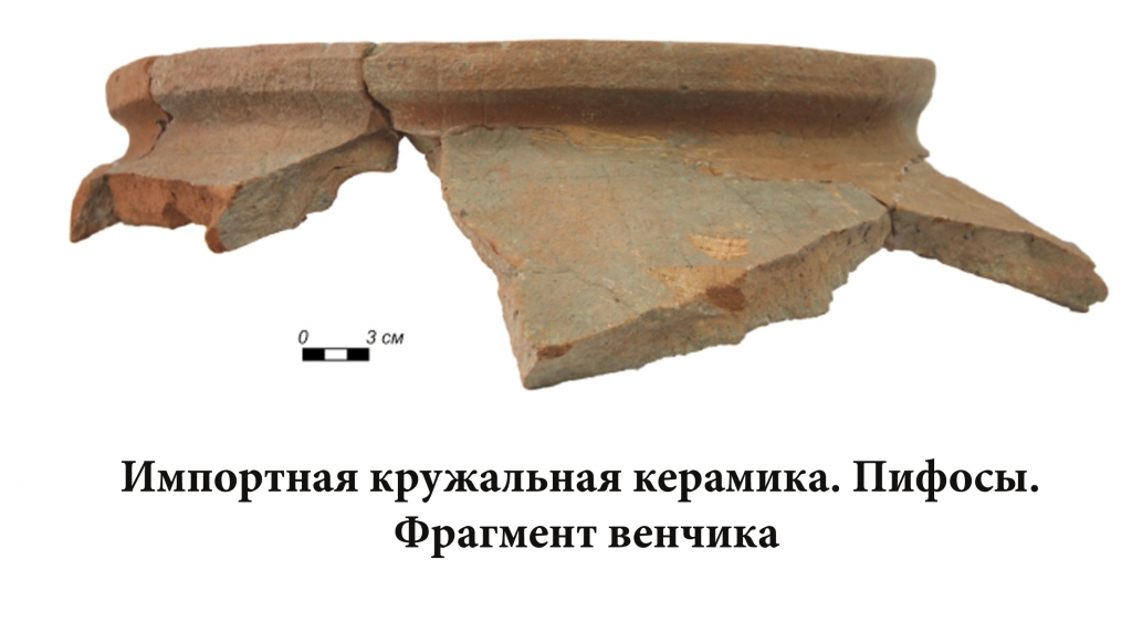 Фрагменты пифоса, обнаруженного при раскопках на хуторе Карском.